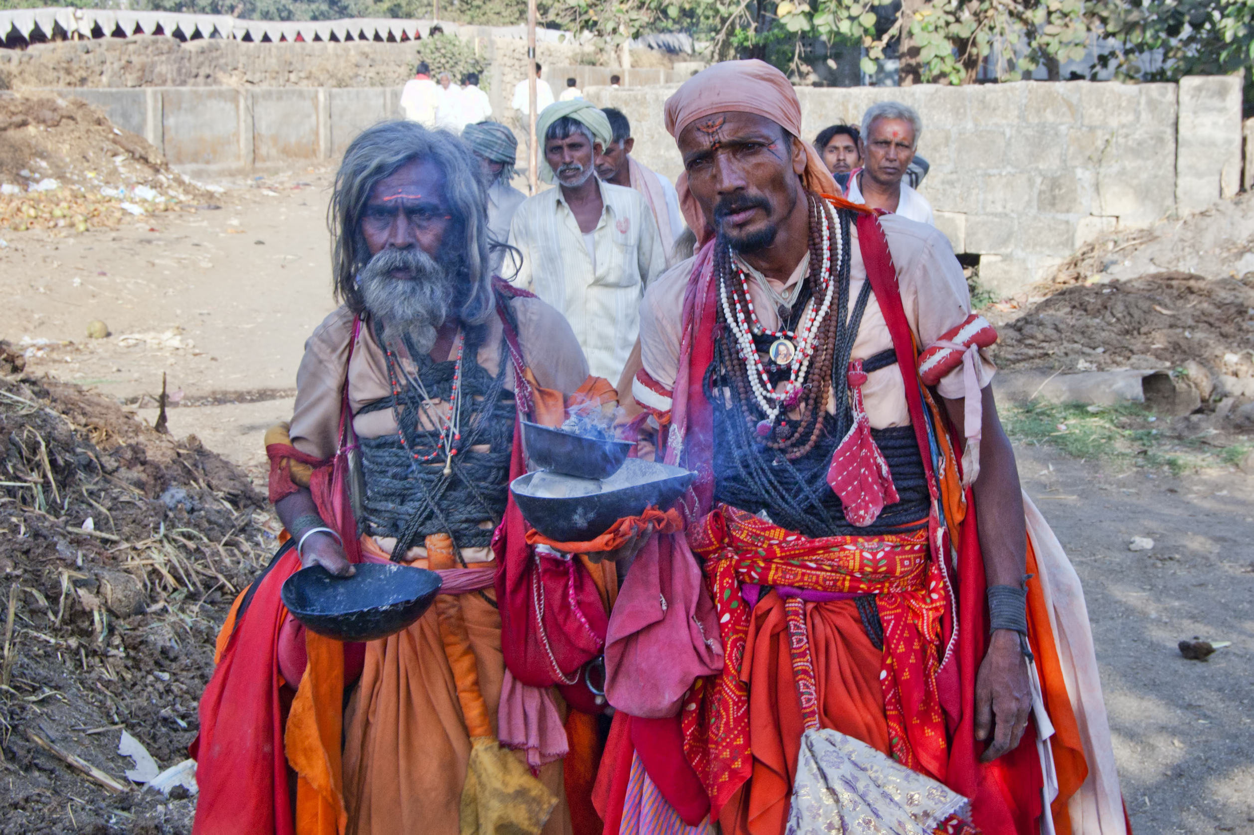 baksheesh